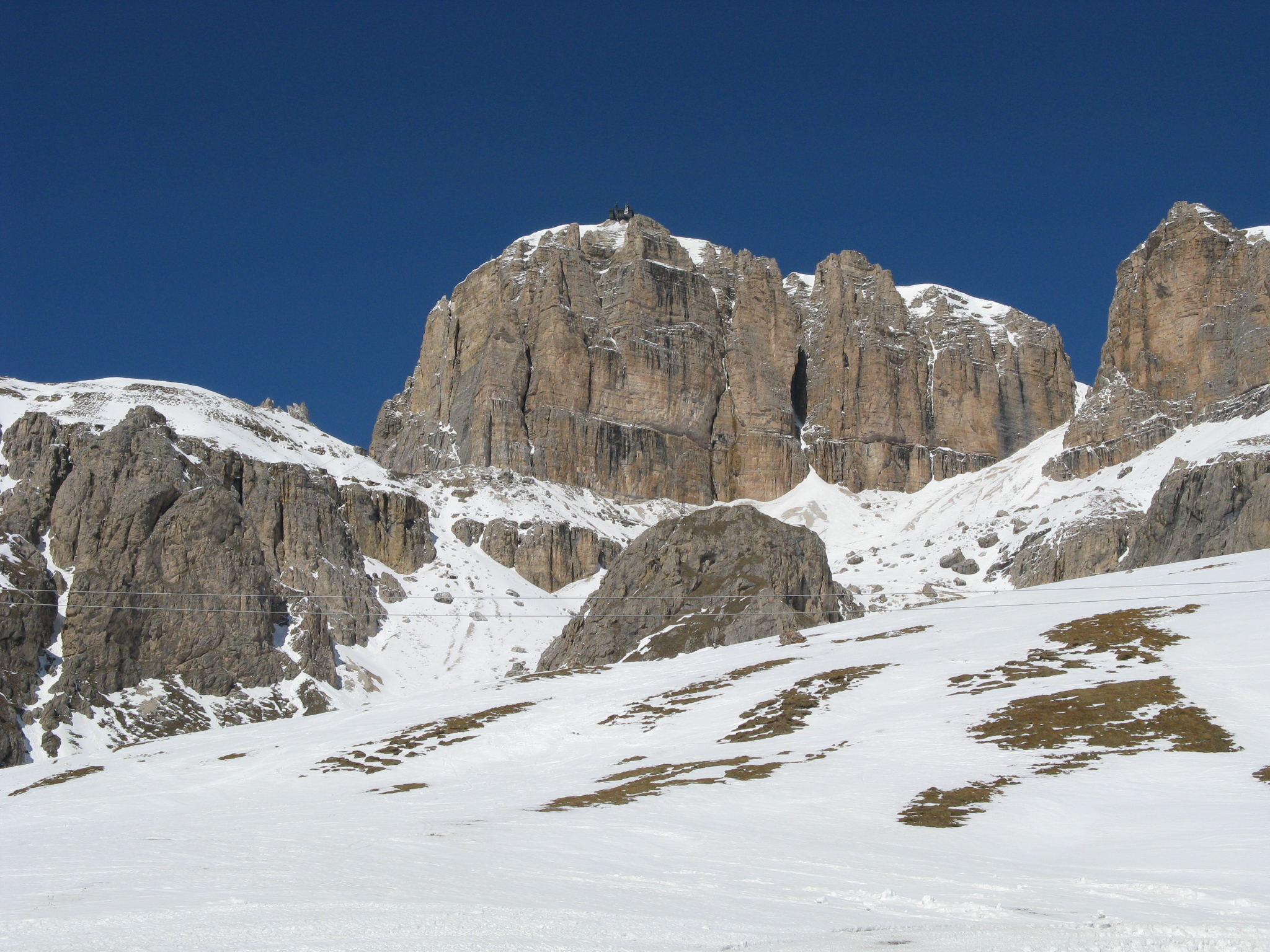 LSass Pordoi